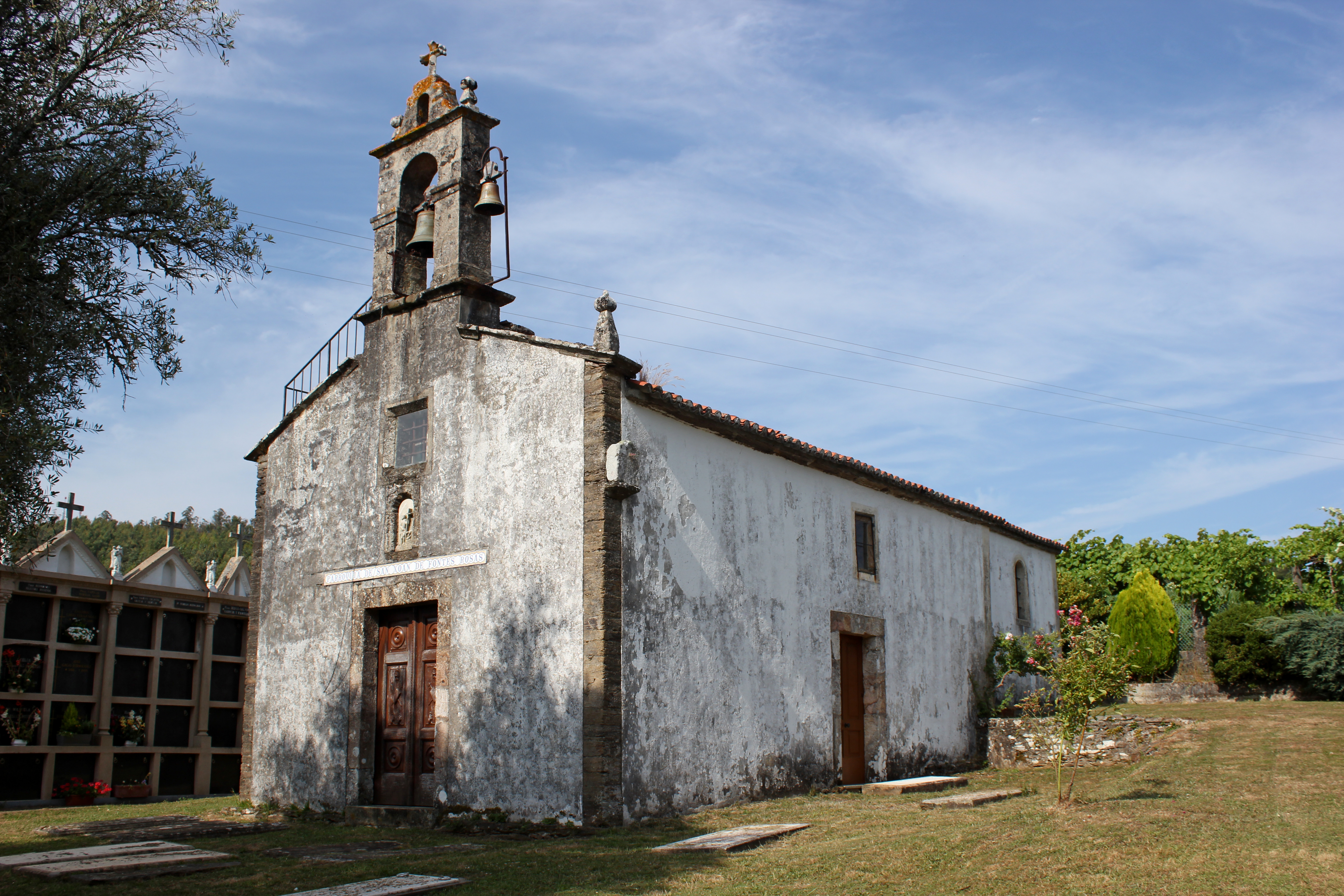 Igrexa de Fontes Rosas no concello de Touro.